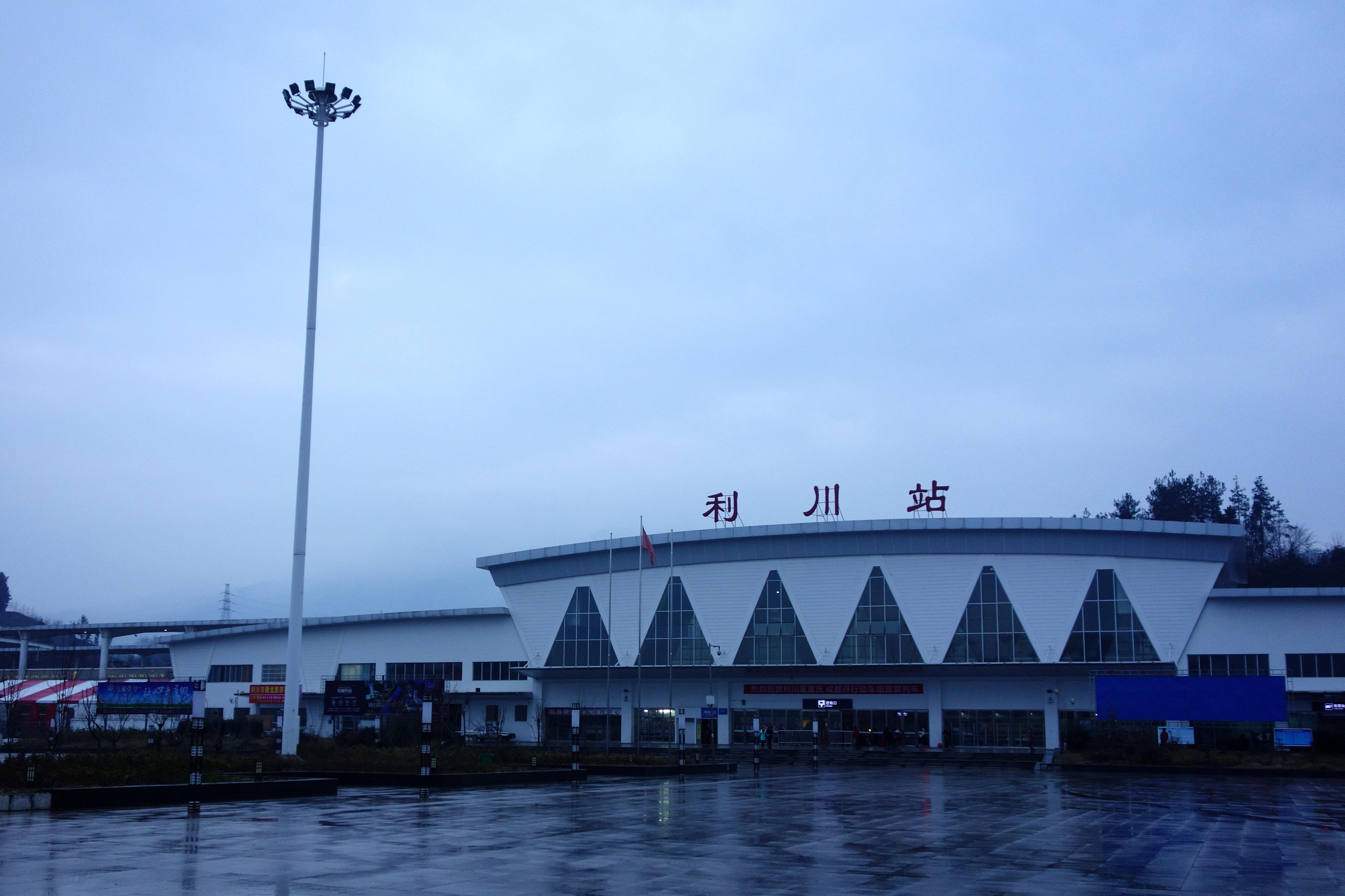 湖北省利川站